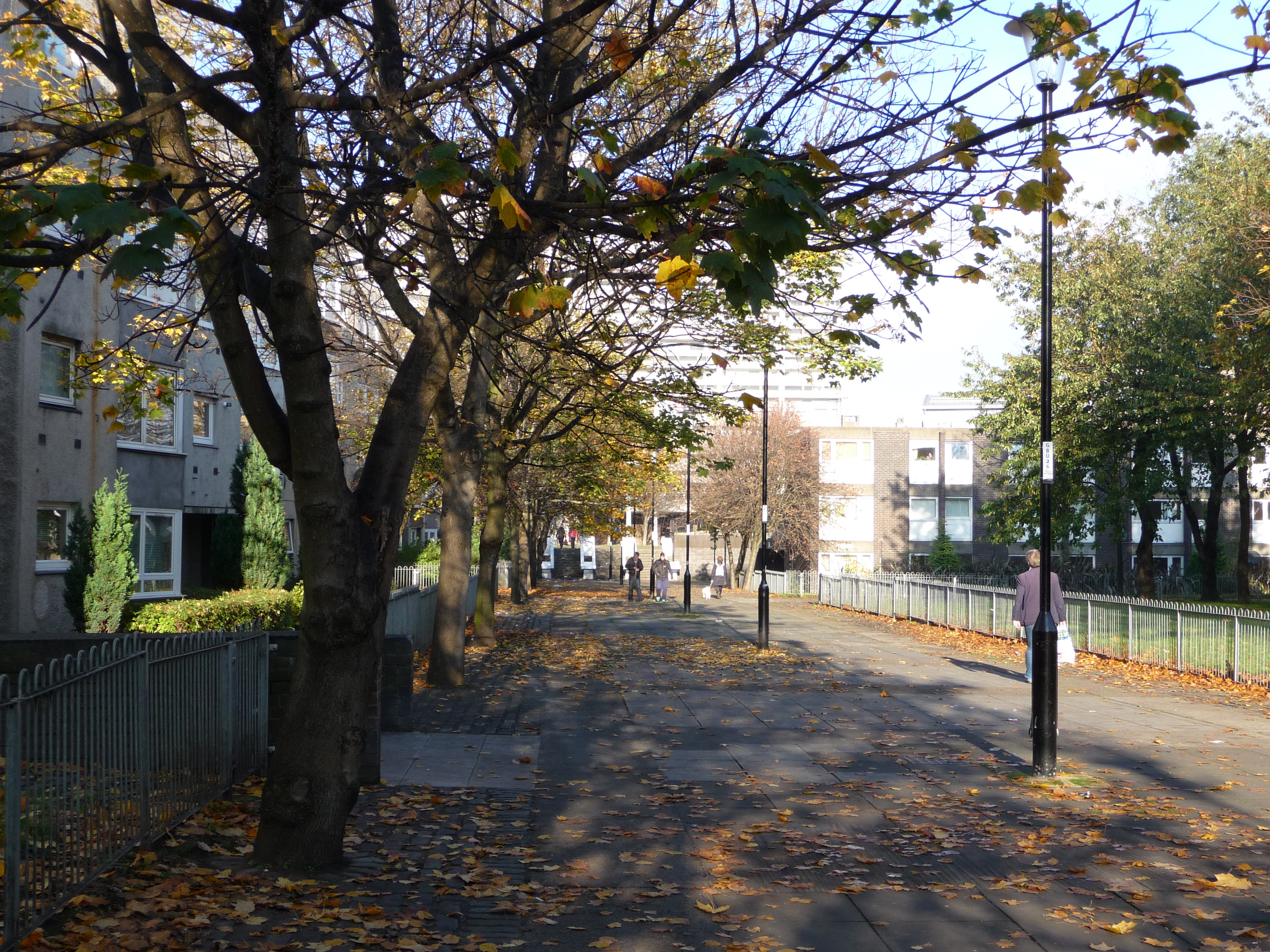 Kirkgate, Leith Nov 2011